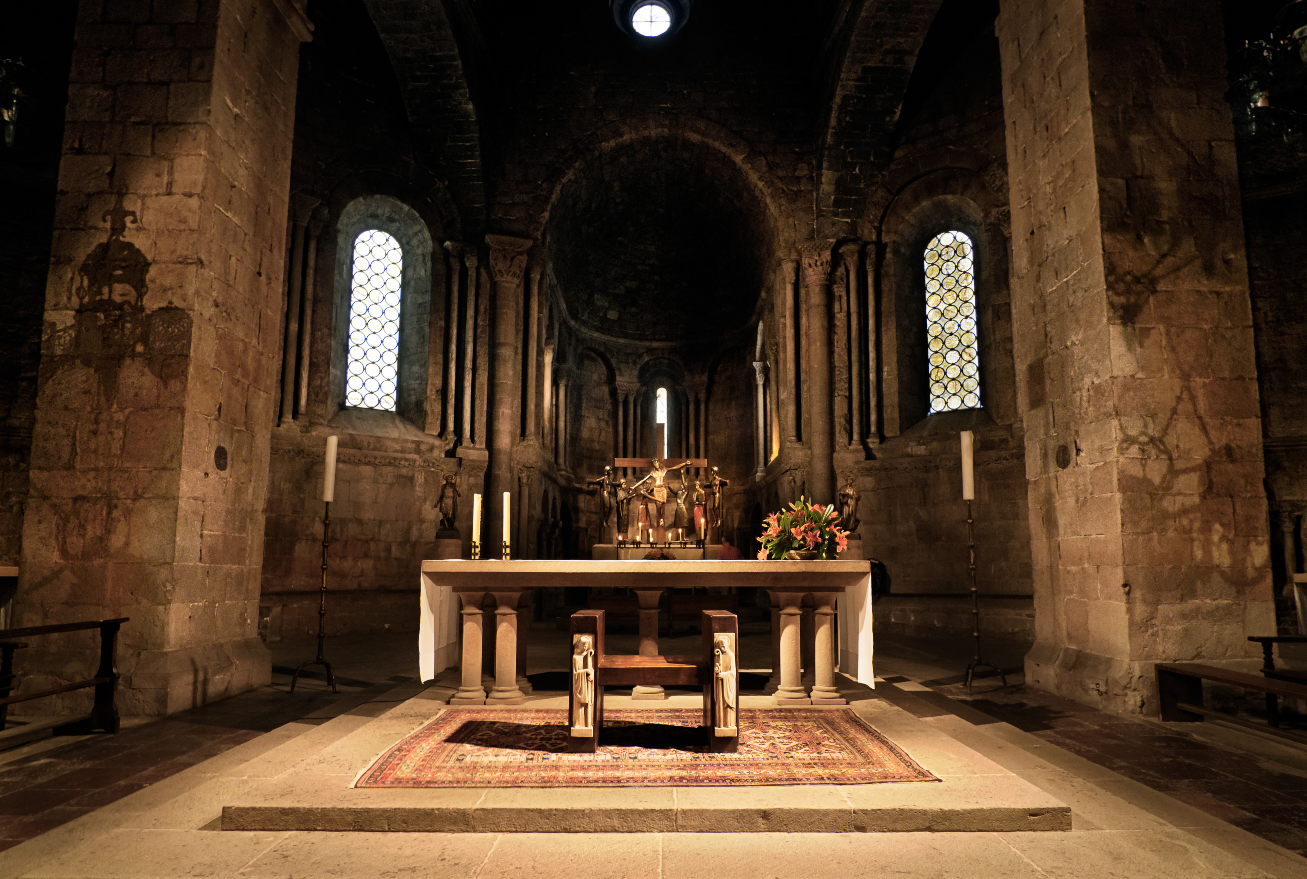 Altar del Monasterio de San Juan de las Abadesas